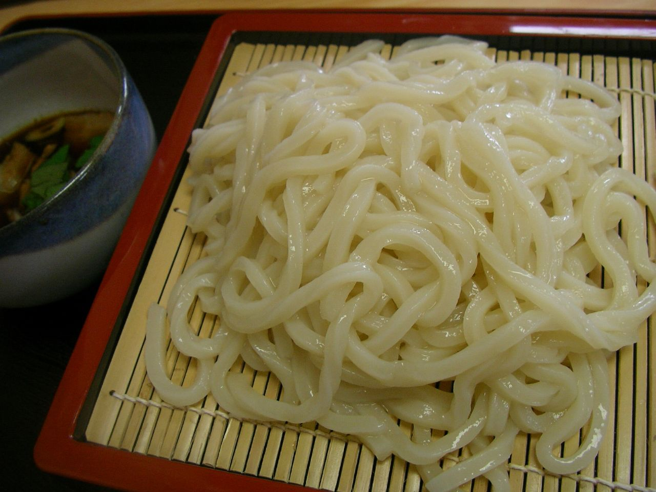 Zaru Udon.